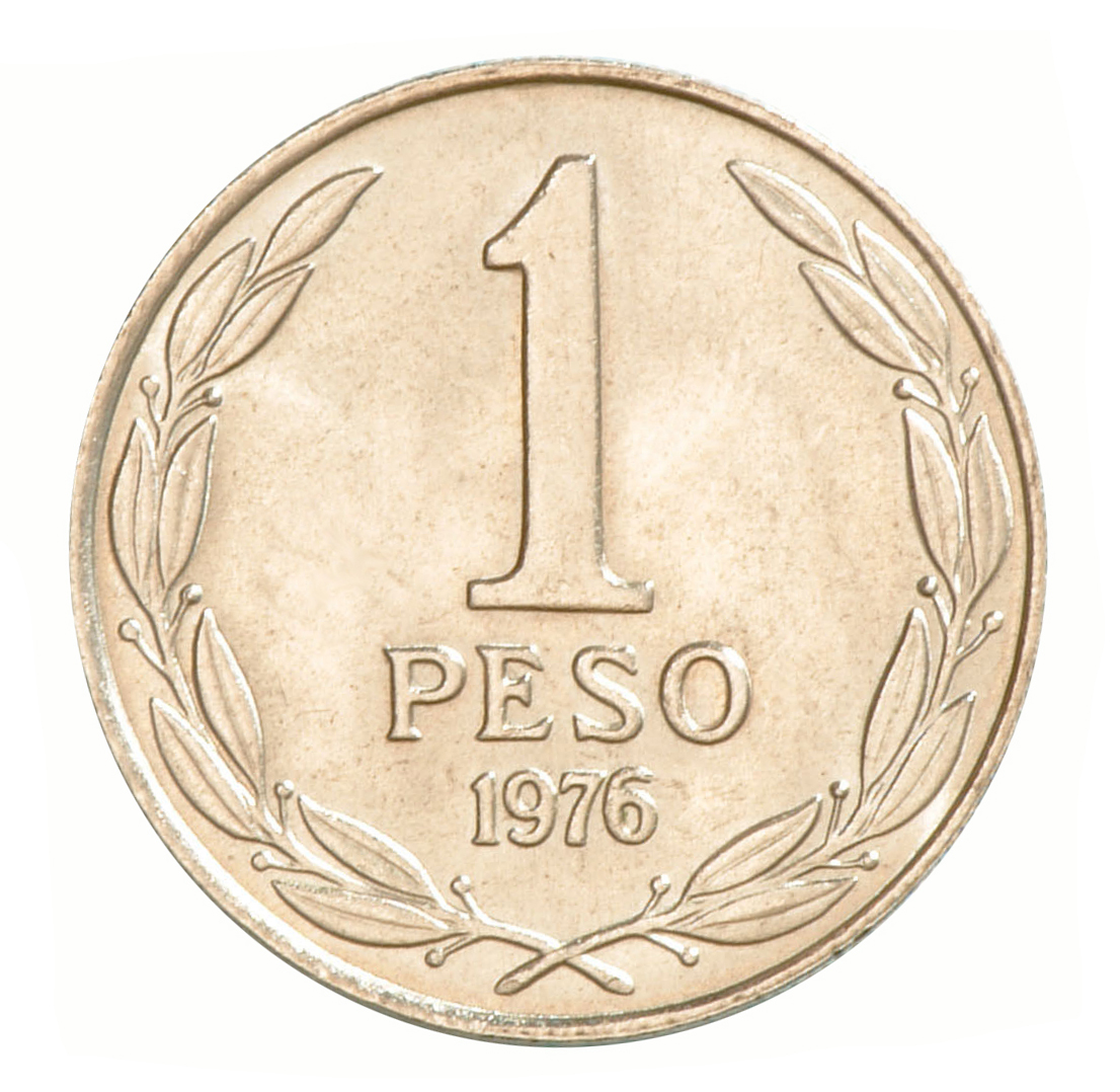 El peso es la unidad monetaria de Chile desde agosto de 1975, cuando reemplazó al Escudo. La primera moneda de $1, emitida entre los años 1975 y 1977, estaba compuesta por una aleación de cobre y níquel. En su anverso tenía un busto de Bernardo O'Higgins y al lado derecho, su nombre. Su reverso tenía el valor de “1”, circundado por una corona de laureles y el año de acuñación. Su diámetro era de 24 milímetros.